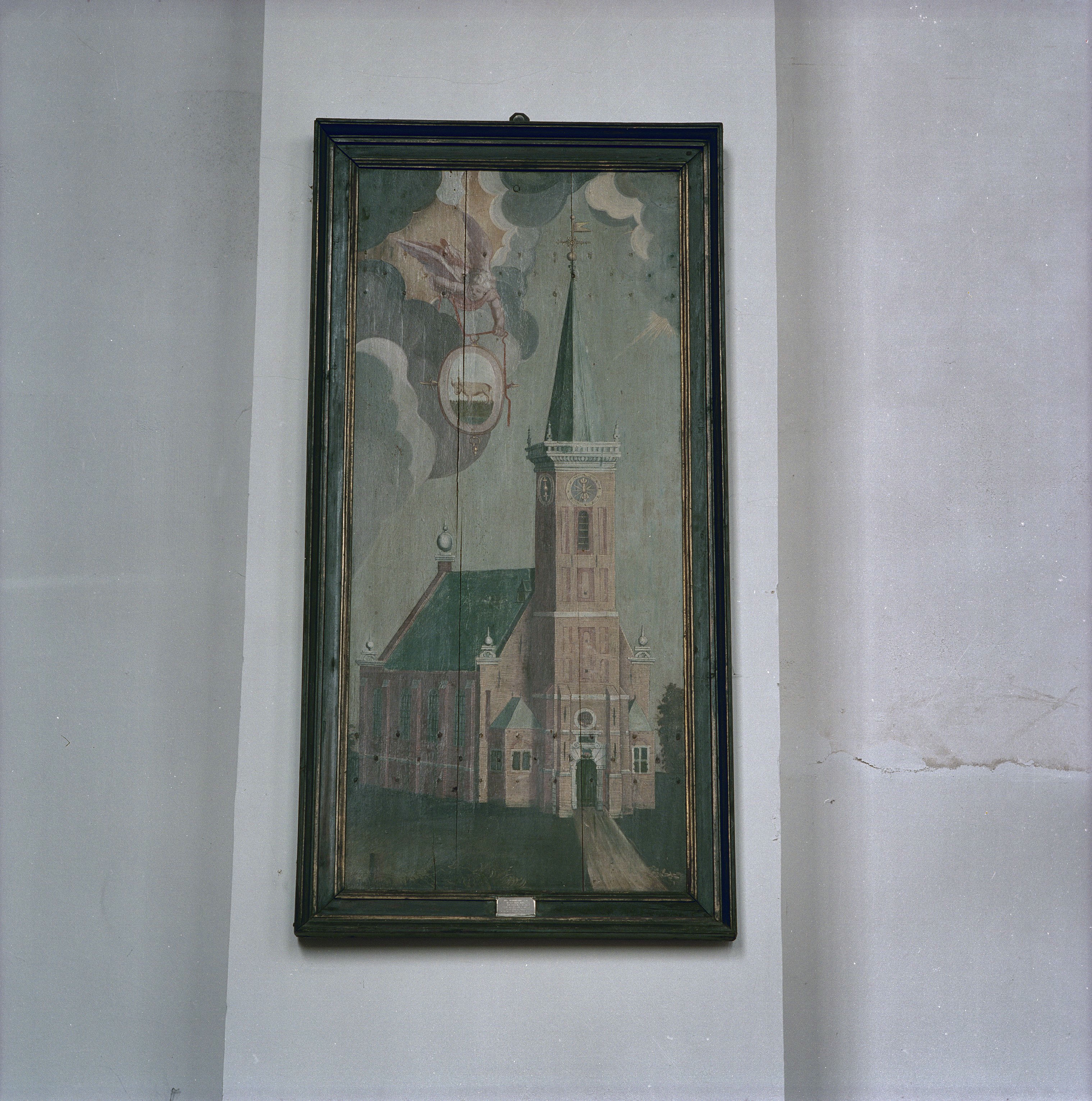 Nederlands Hervormde Kerk: Schilderij met de hervormde kerk (opmerking: Werelderfgoed Beemster)